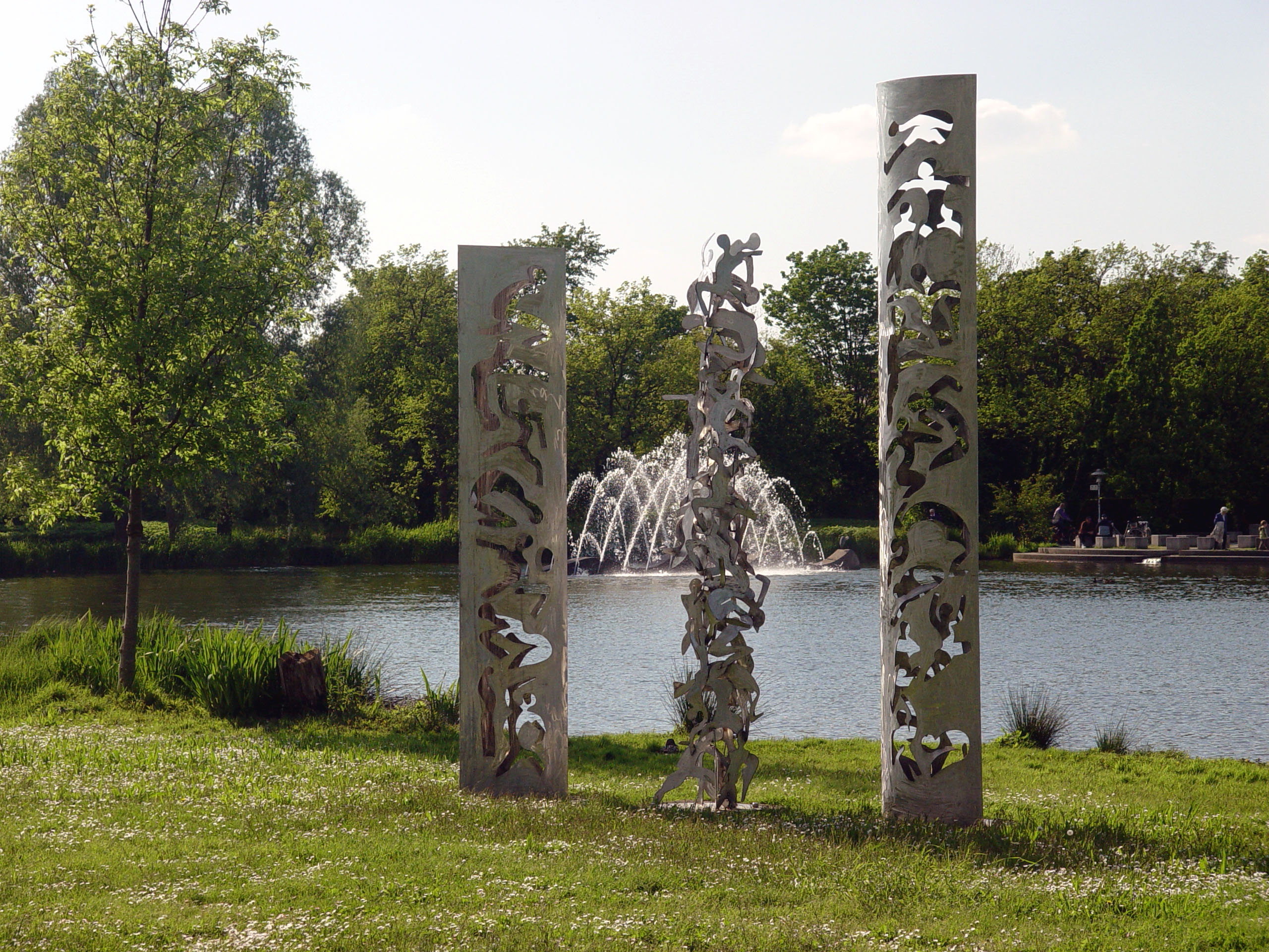 gemeinfrei, fotografiert von Martin Dürrschnabel Motiv: Skulptur im Horbach-Park in Ettlingen Kamera: Sony DSC F717